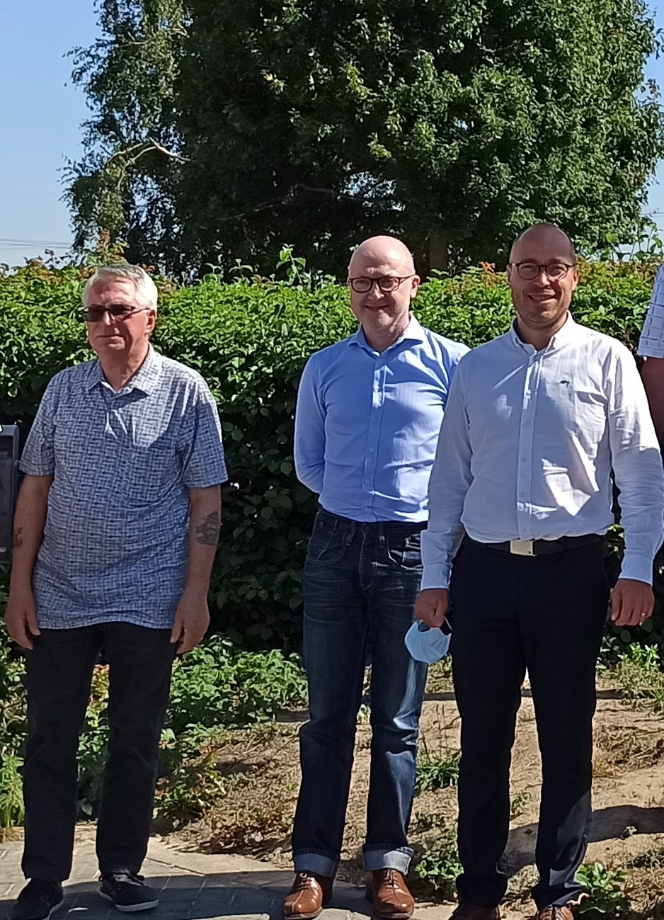 Michel Quiévy, maire de Mortagne-du-Nord et premier vice-président de la CAPH, Régis Roussel, maire d'Émerchicourt, et Aymeric Robin, maire de Raismes et président de la Communauté d'agglomération de la Porte du Hainaut (CAPH) en visite le 29 juillet 2020 à Émerchicourt Depicted people: Michel Quiévy, Régis Roussel and Aymeric Robin Depicted place: Émerchicourt